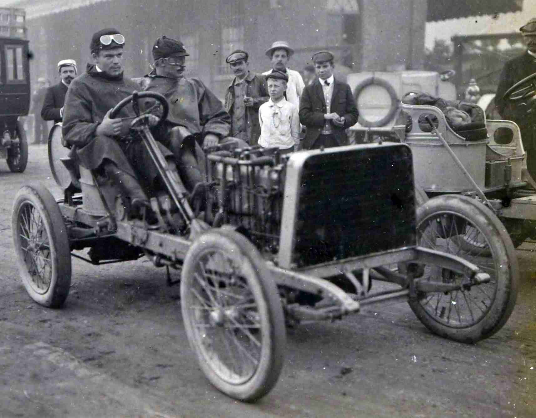 [Collection Jules Beau. Photographie sportive] : T. 30. AnnÃ©e 1905 / Jules Beau : F. 39. [Circuit des Ardennes, 7 aoÃ»t 1905]